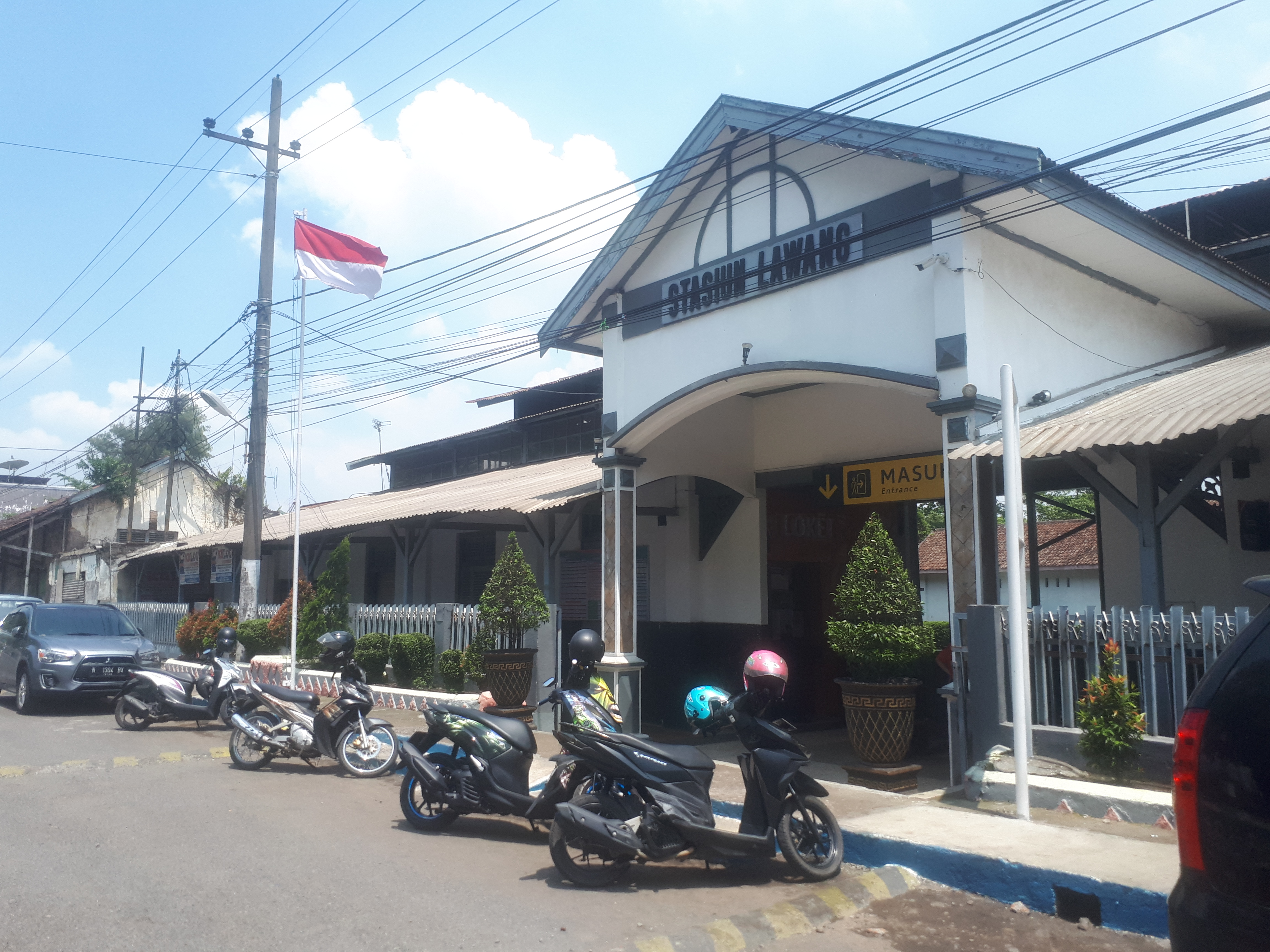 Muka depan Stasiun Lawang tahun 2019.